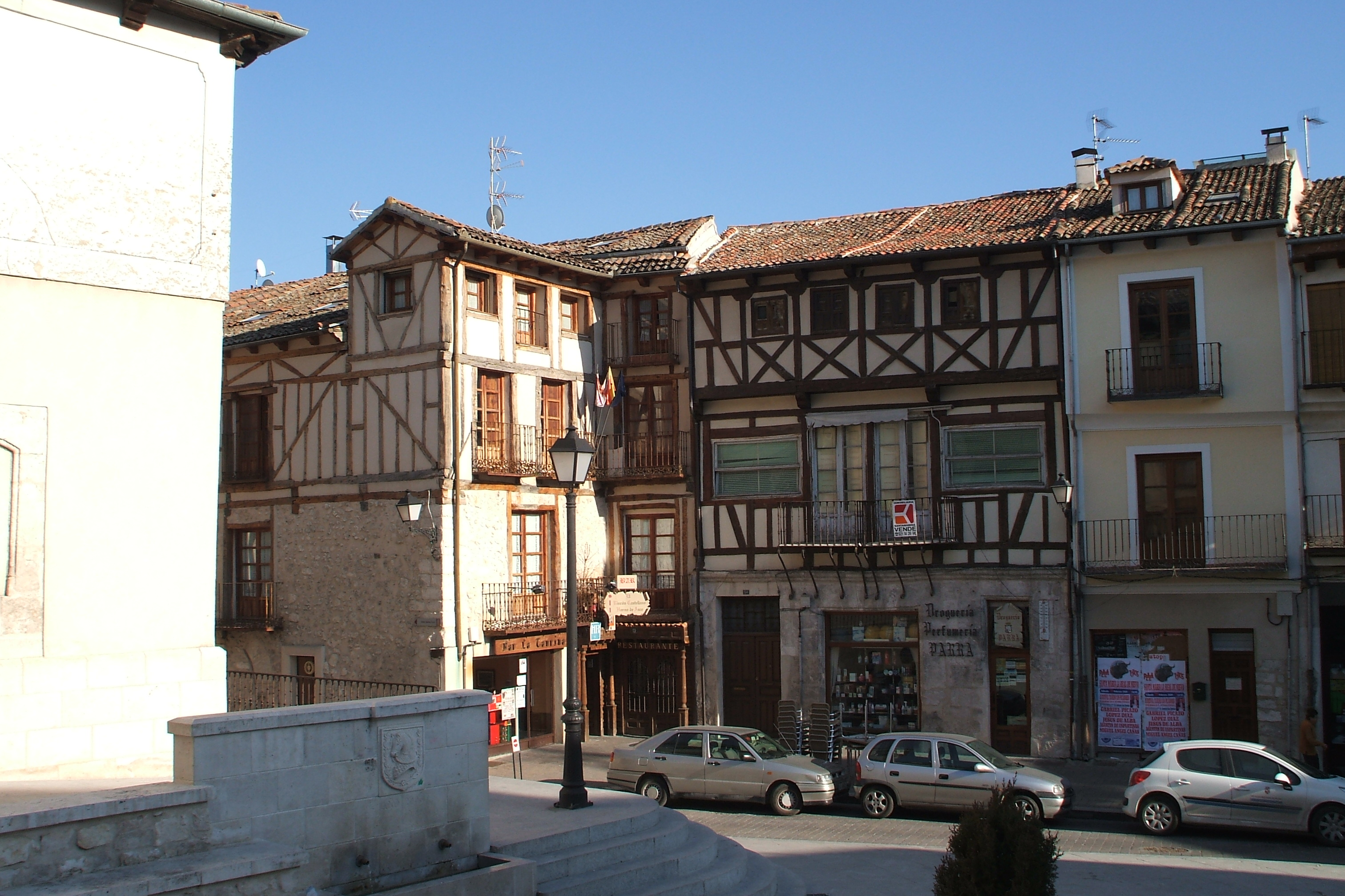 Rincón sureste de la plaza mayor de Cuéllar (Segovia)